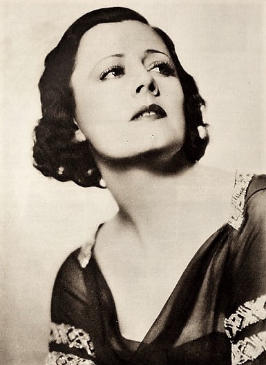 Irene Dunne